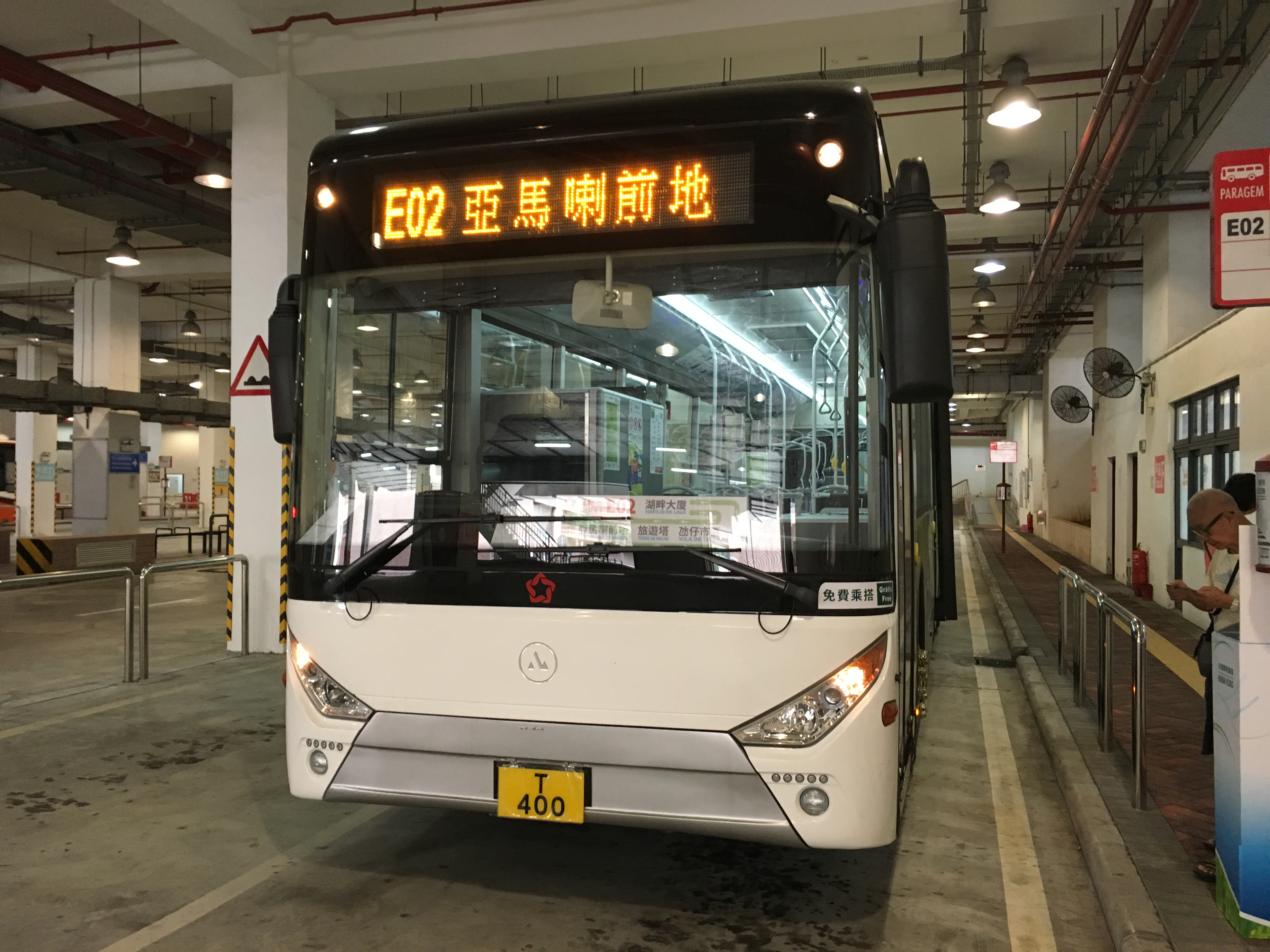 新時代引入的澳洲AVASS BNE6125CBEV行駛E02電動巴士路線.